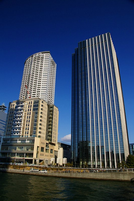 Hotarumachi, Fukushimaku, Osaka City, Japan.